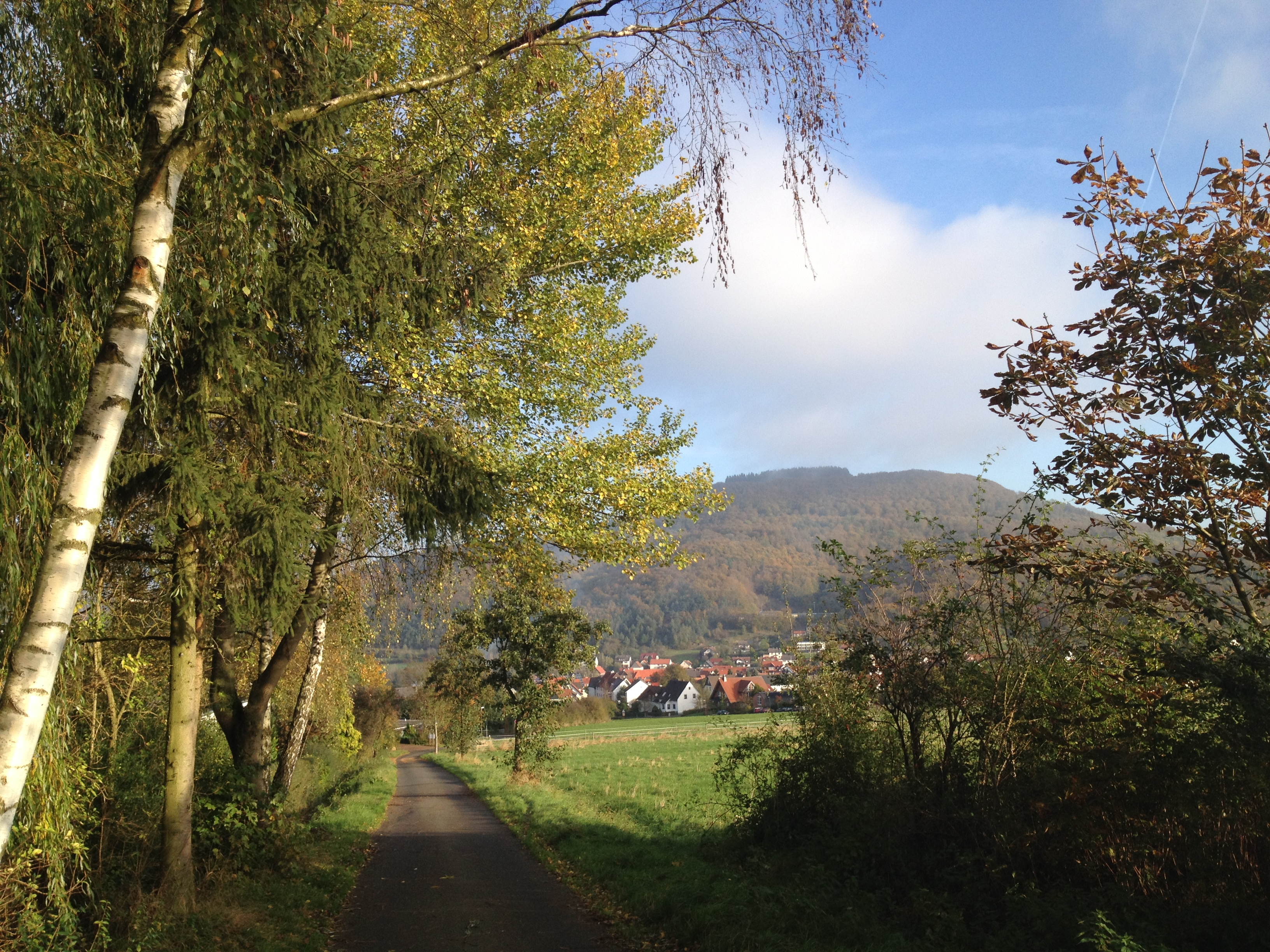 Blick vom Eco Pfad Kulturgeschichte Habichtswald (Straße Kuhnen) und den lokalen Wanderweg D3, D4 und Ʌ auf Dörnberg, im Hintergrund der Hohe Dörnberg